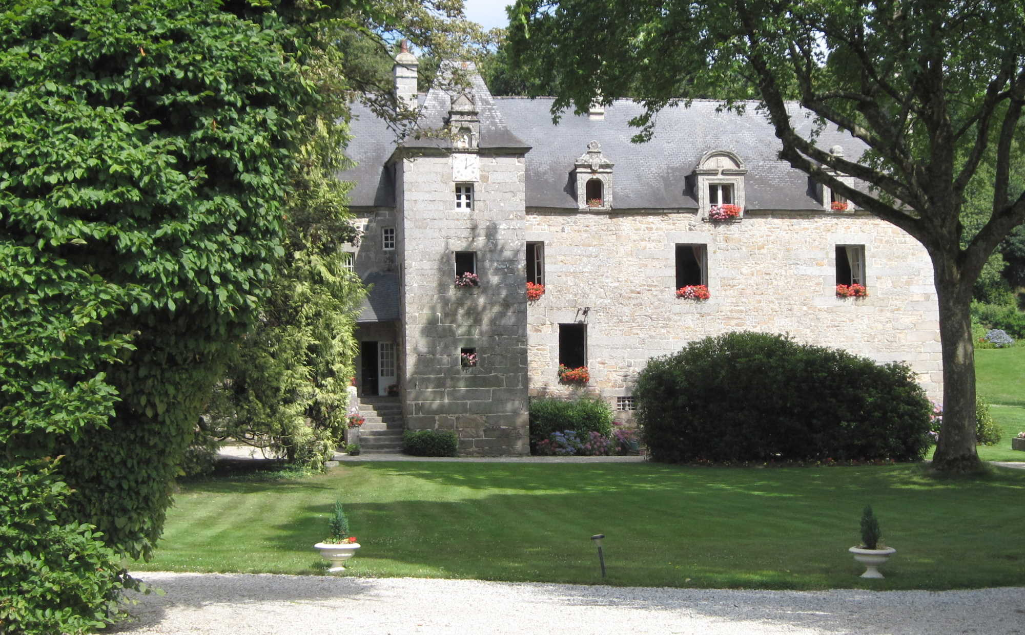 Saint Nicolas Du Pélem - Chateau du Pélem .